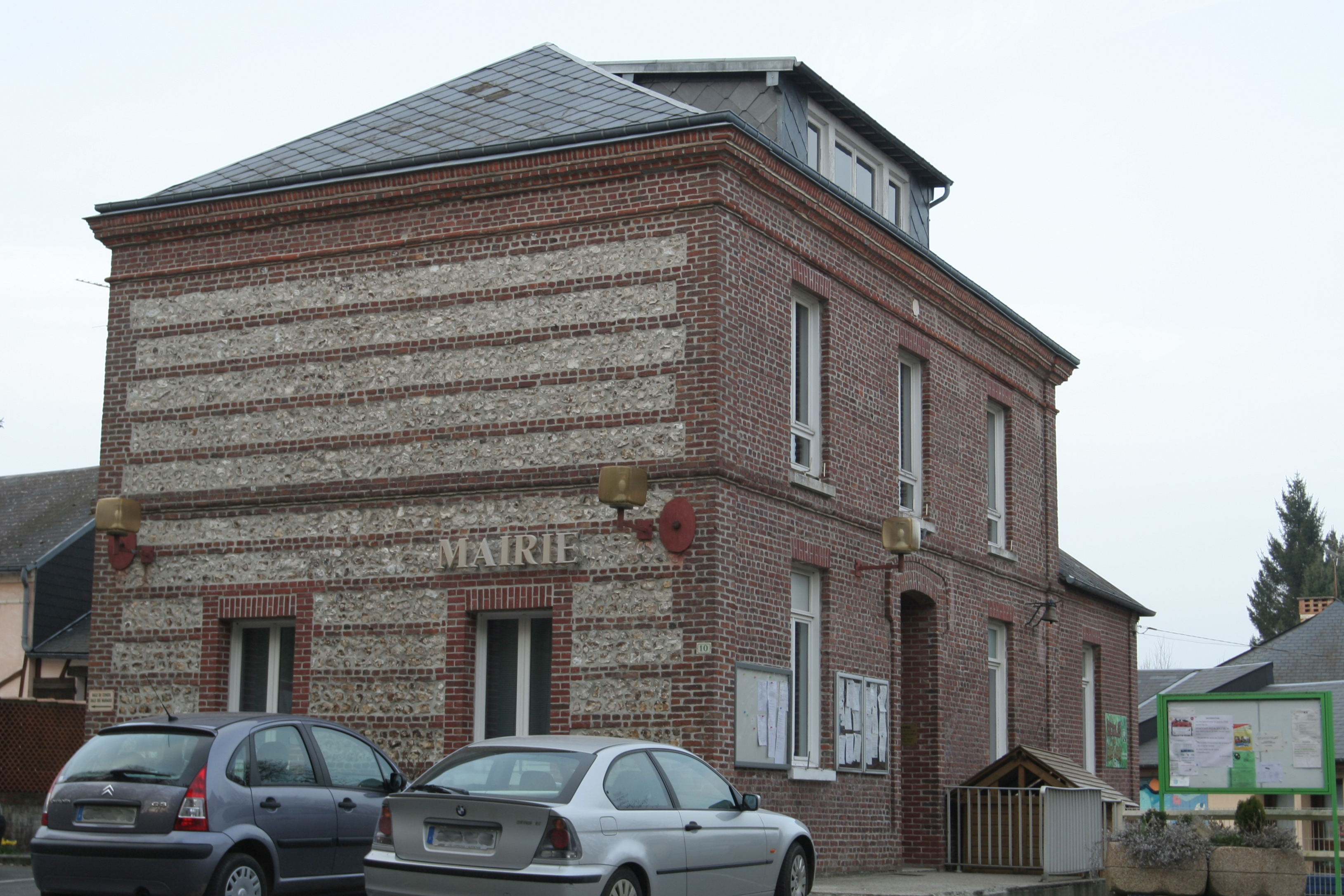 Mairie de Saint-Aubin-Routot.